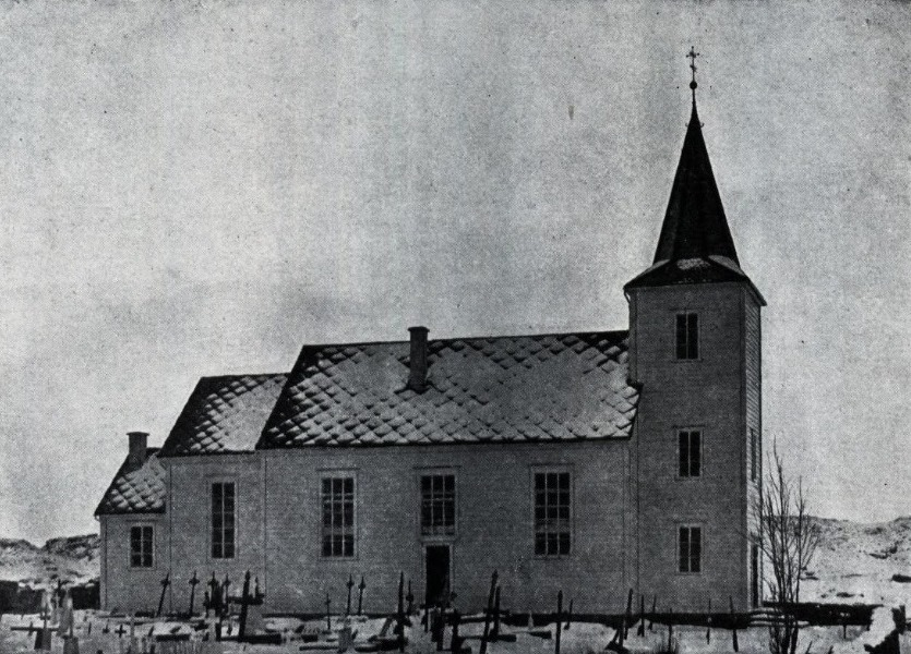 Kausland kirke i Sund kommune, opprinnelig utseende. Bilde gjengitt i B.D. Bendixen: Kirkerne i Søndre Bergenshus Amt (Grieg: Bergen, 1904), s. 390.